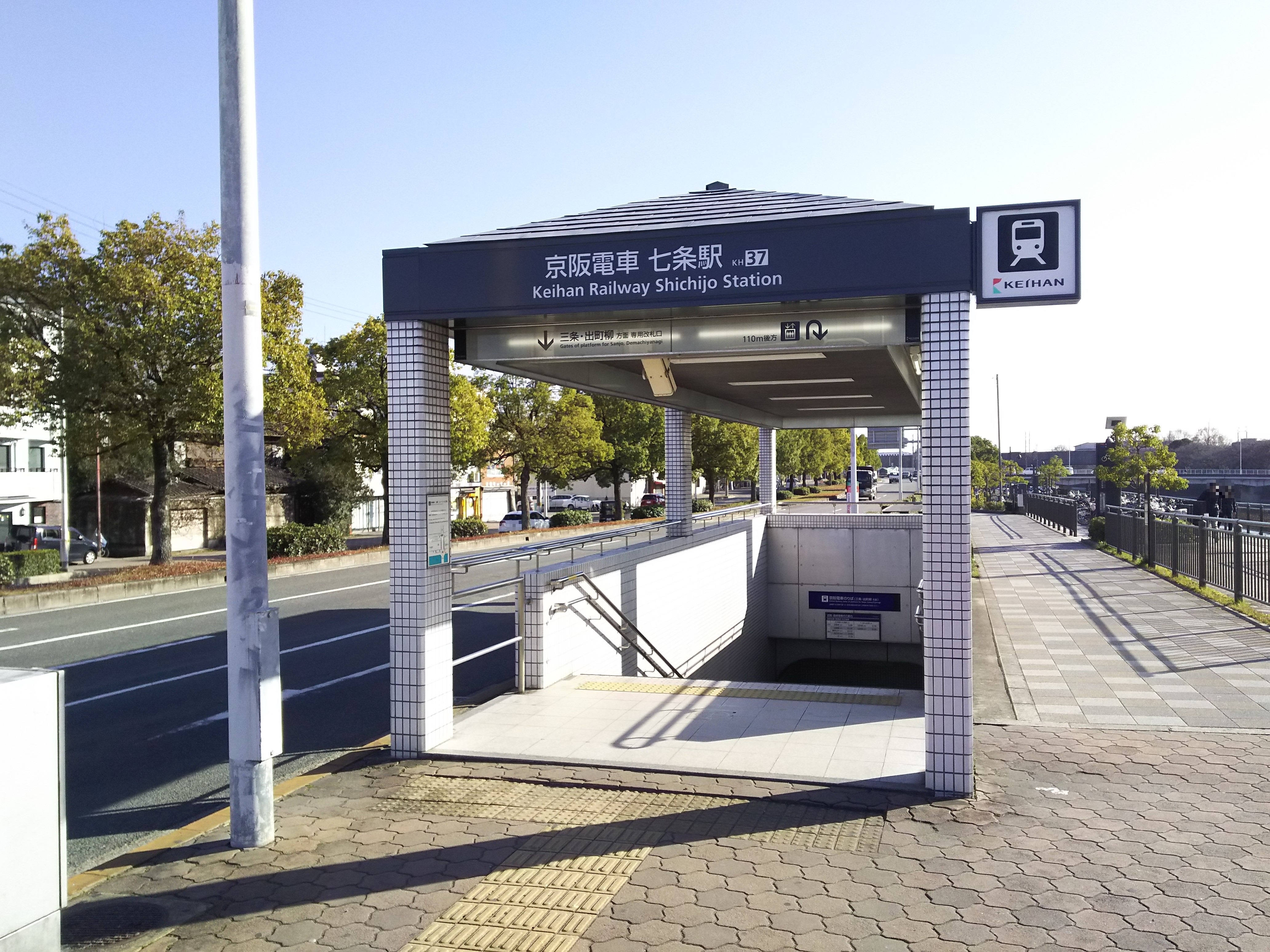 京阪本線七条駅出入口（京都市東山区）